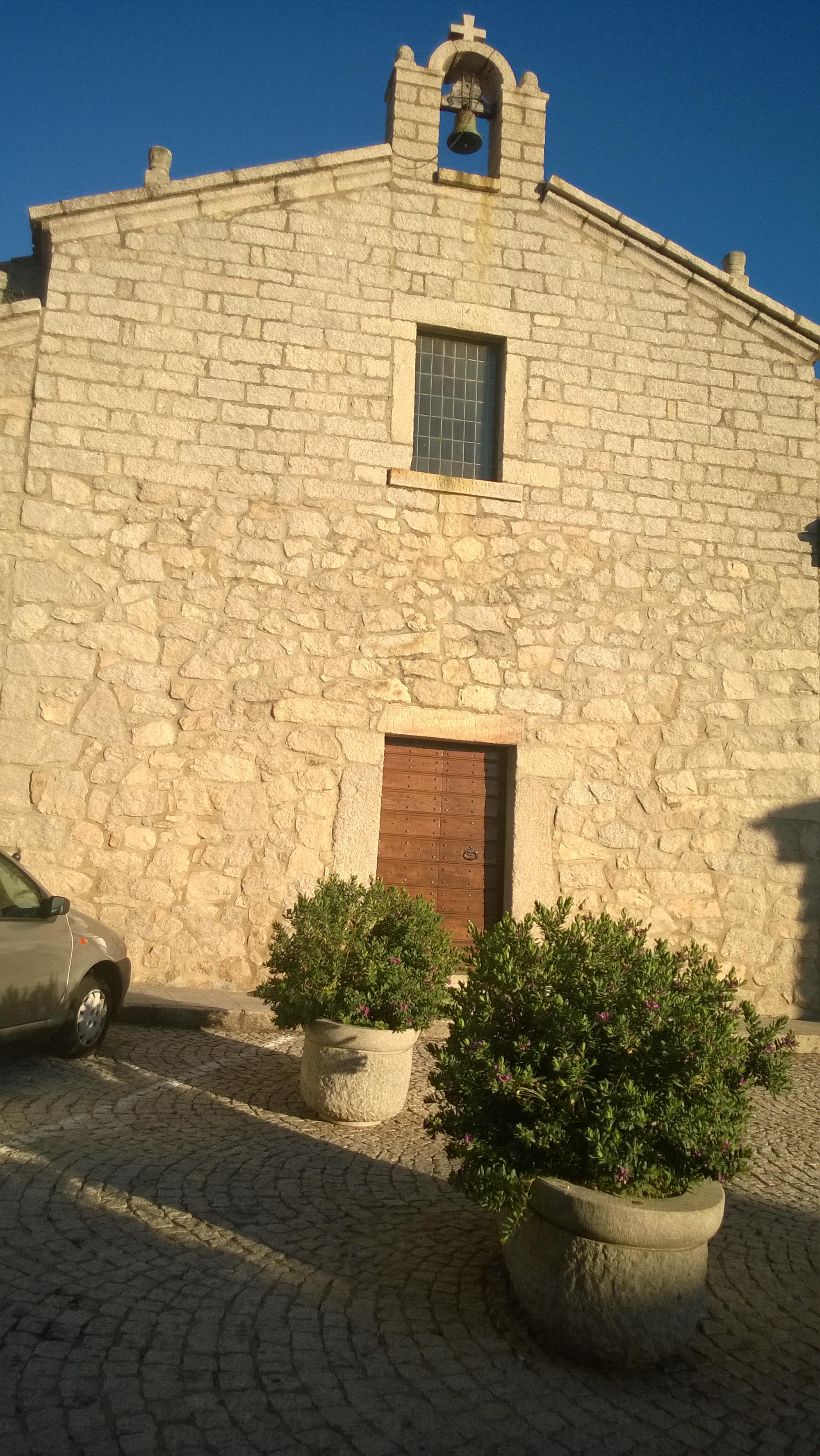 L'oratorio di Santa Croce, situato in piazza Santa Giusta, è un edificio religioso eretto nel 1646 a Calangianus.